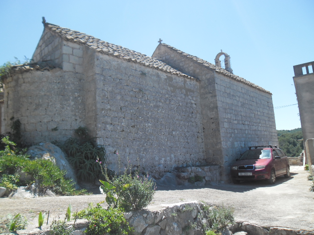 Crkva svetog Vlaha u mjestu Lastovu